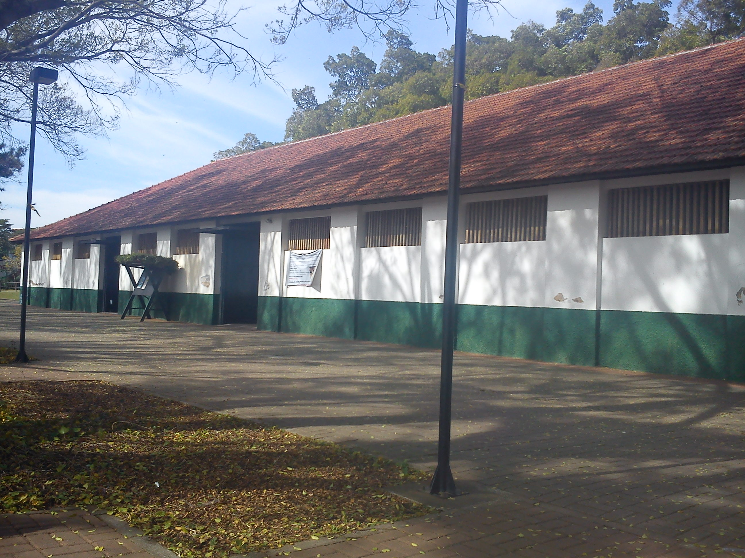 Antigo salão da Sociedade Paulista de Trote, em 2011. Hoje em dia, usado como salão de atividades do Parque Da Vila Guilherme.